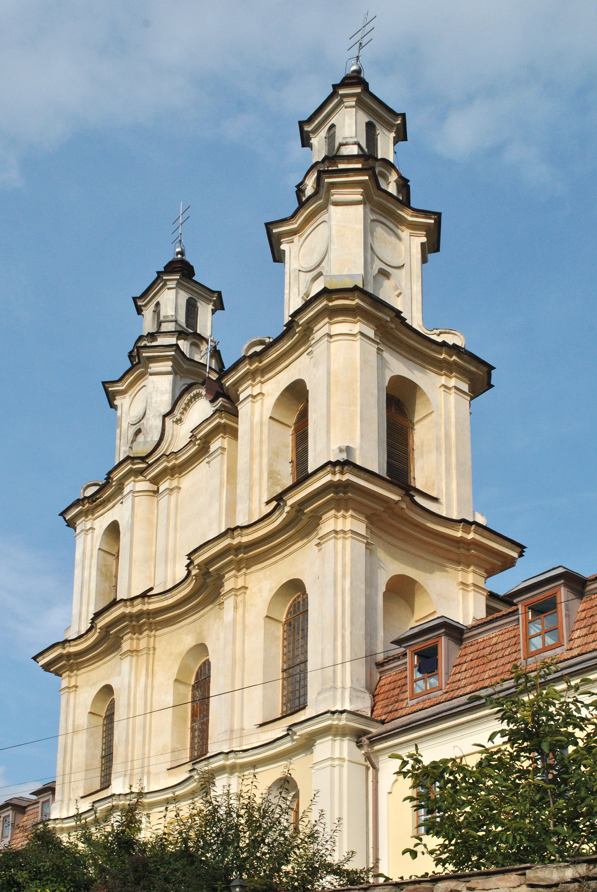 Здвиженська церква (мурована) Василіанського монастиря в Бучачі (вул. А. Міцкевича, 19) Тернопільської області.